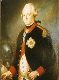 Graf von Heydeck, seit 1789 Fürst Karl August Friedrich Joseph von Bretzenheim (1758-1823) (Gemälde um 1790)